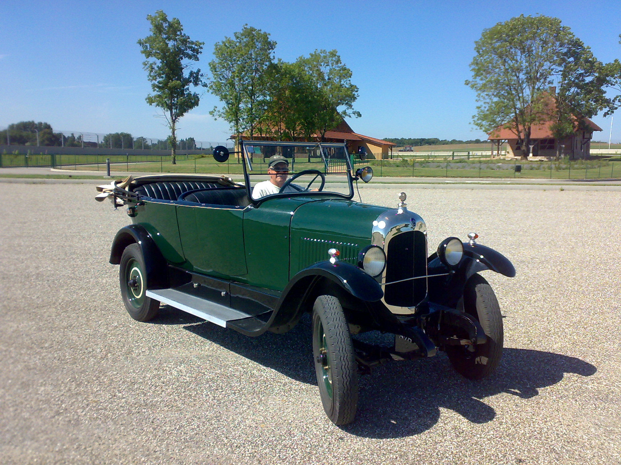 Une Citroën B12